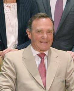 הנסיך מישל דה לינייה נכדו של איז'ן השני לבית לינייה חסיד אומות עולם, בפגישה בבית נשיא מדינת ישראל ראובן ריבלין עם ניצולי שואה וצאצאי חסידי אומות עולם וניצולי שואה